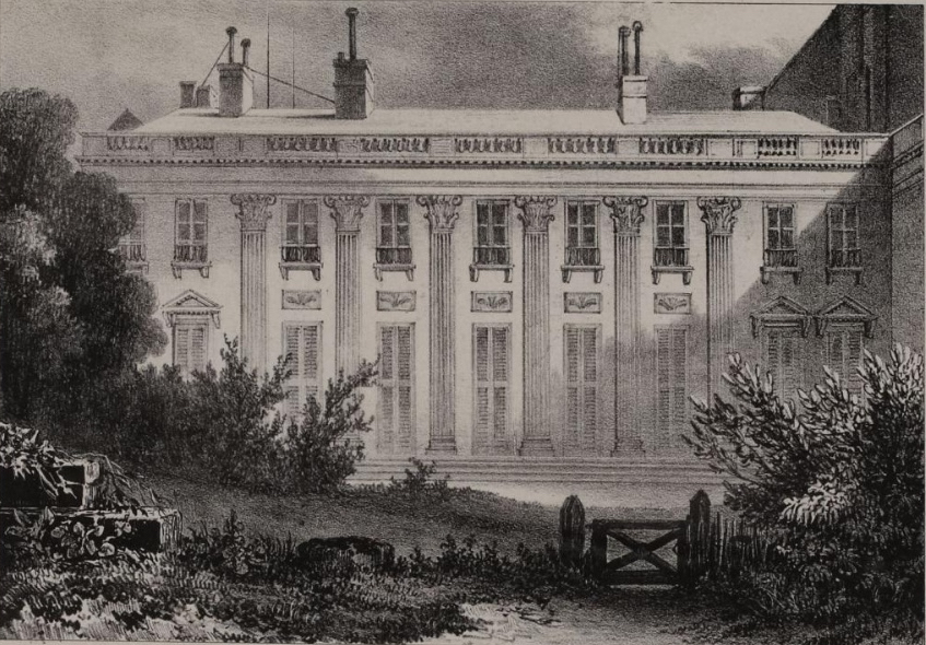 Hôtel Laffitte (Paris)